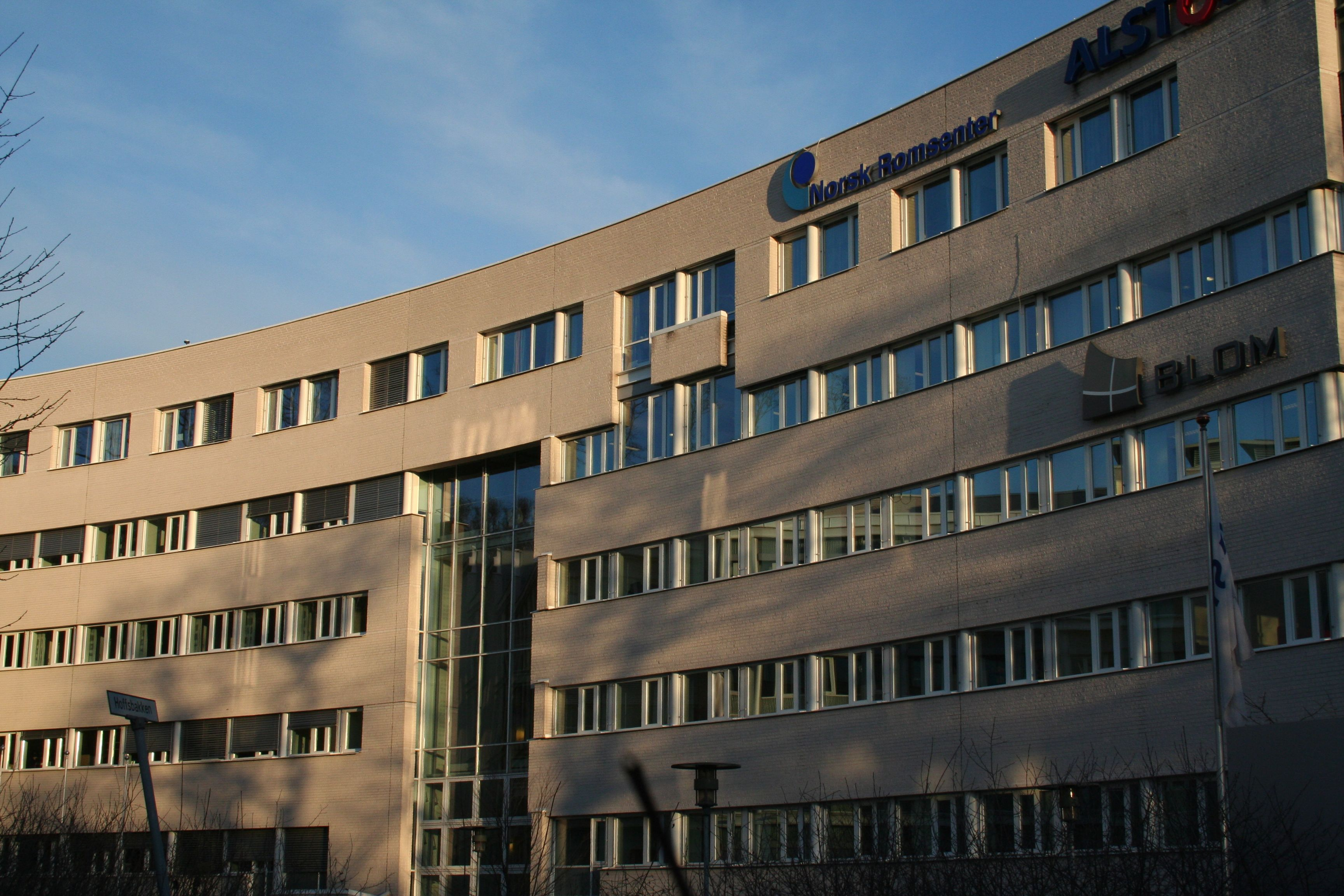 Norsk Romsenter på Skøyen i Oslo.